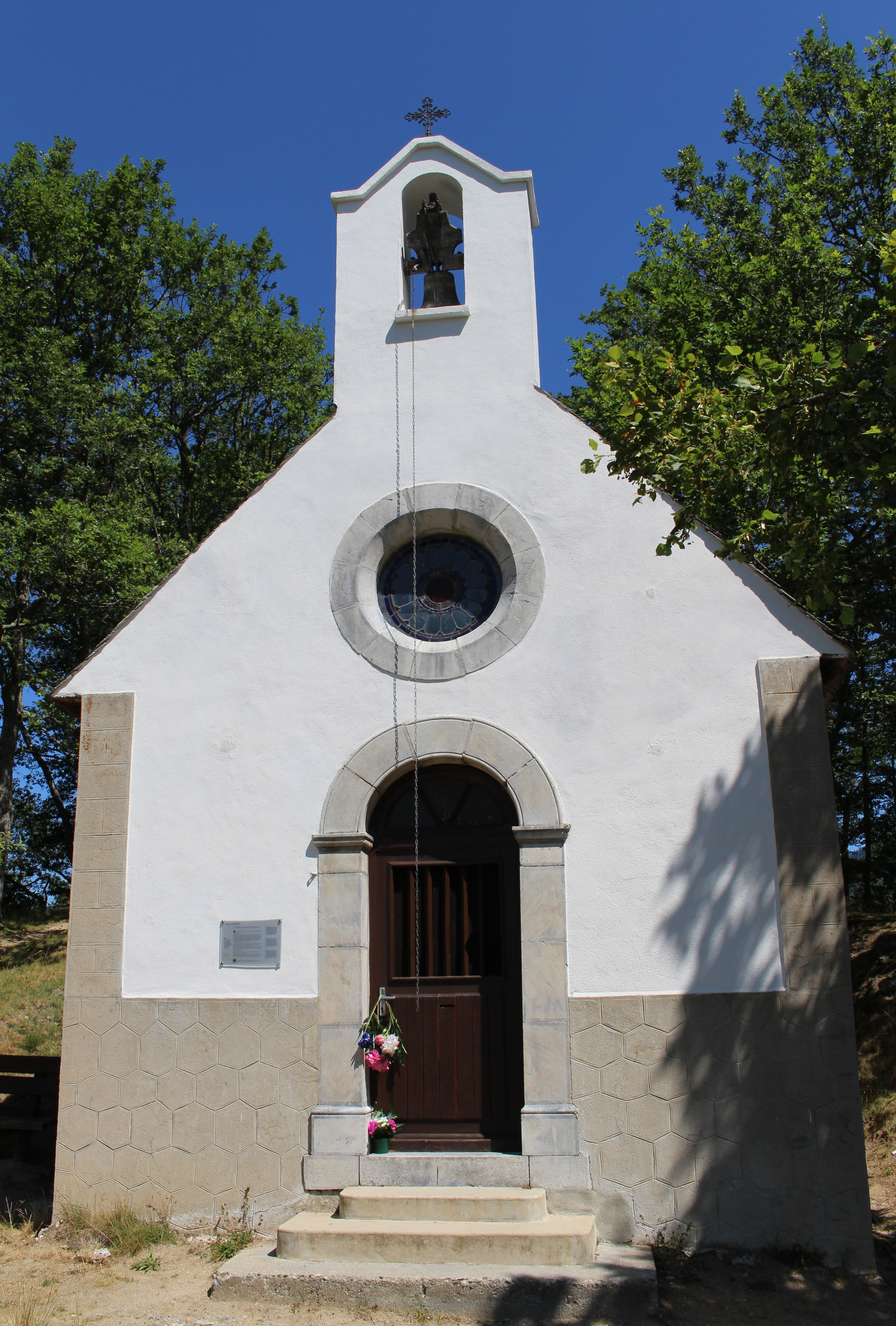 Chapelle Notre-Dame des Neiges de Ris (Hautes-Pyrénées)